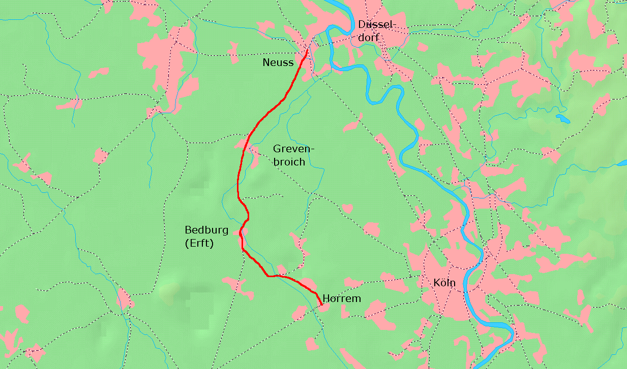 Karte der Erftbahn